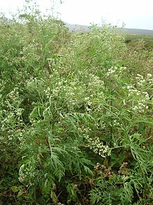 பார்த்தீனியம்